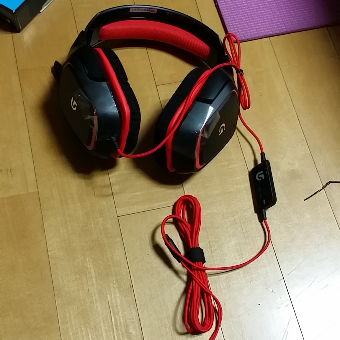 로지텍 G230 헤드셋